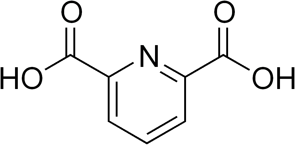 chemical structure of dipicolinic acid